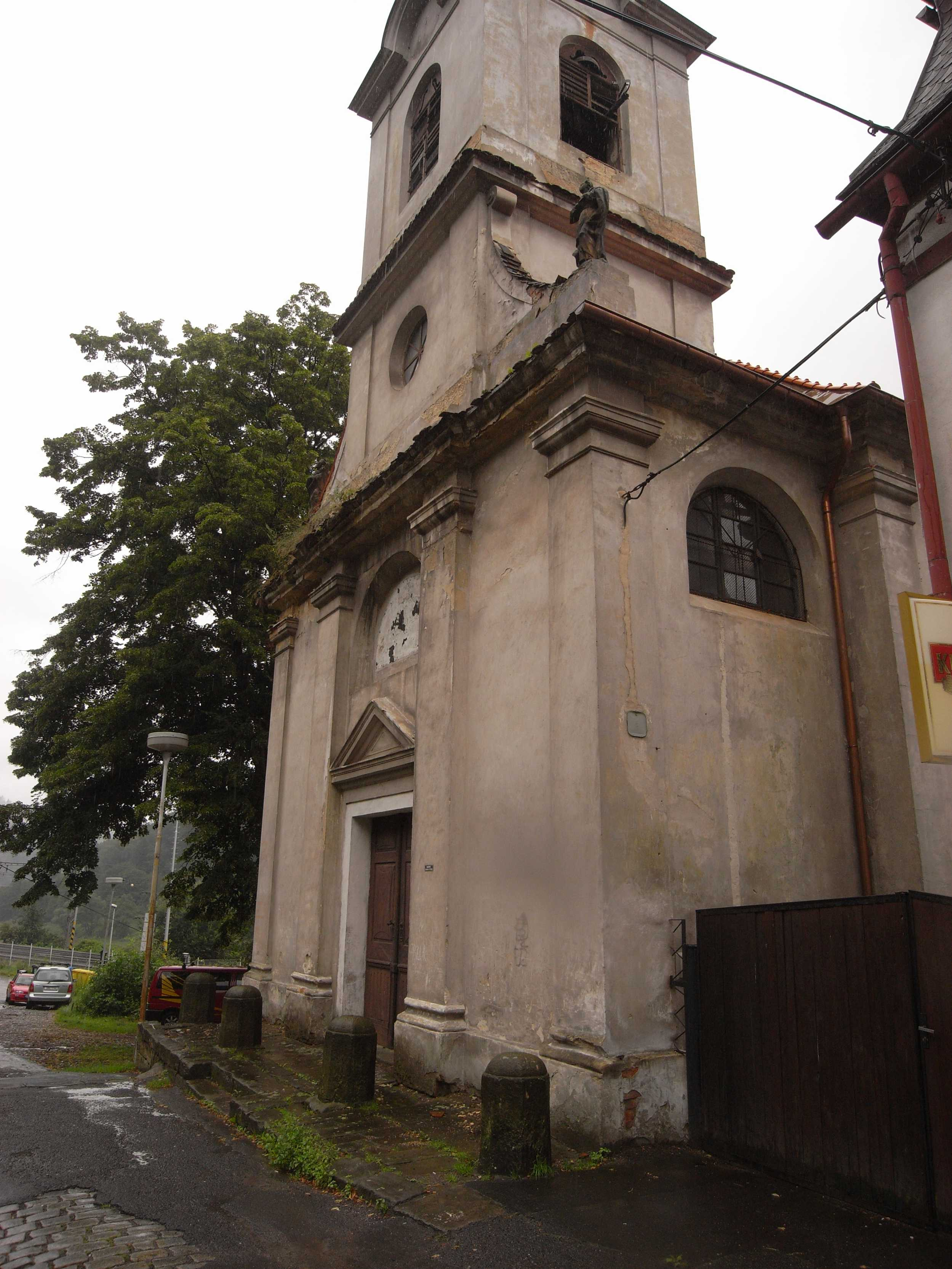 Dolní Žleb / Niedergrund, klassizistische Kirche zur Allerheiligen Dreifaltigkeit (Böhmische Schweiz, Tschechische Republik)